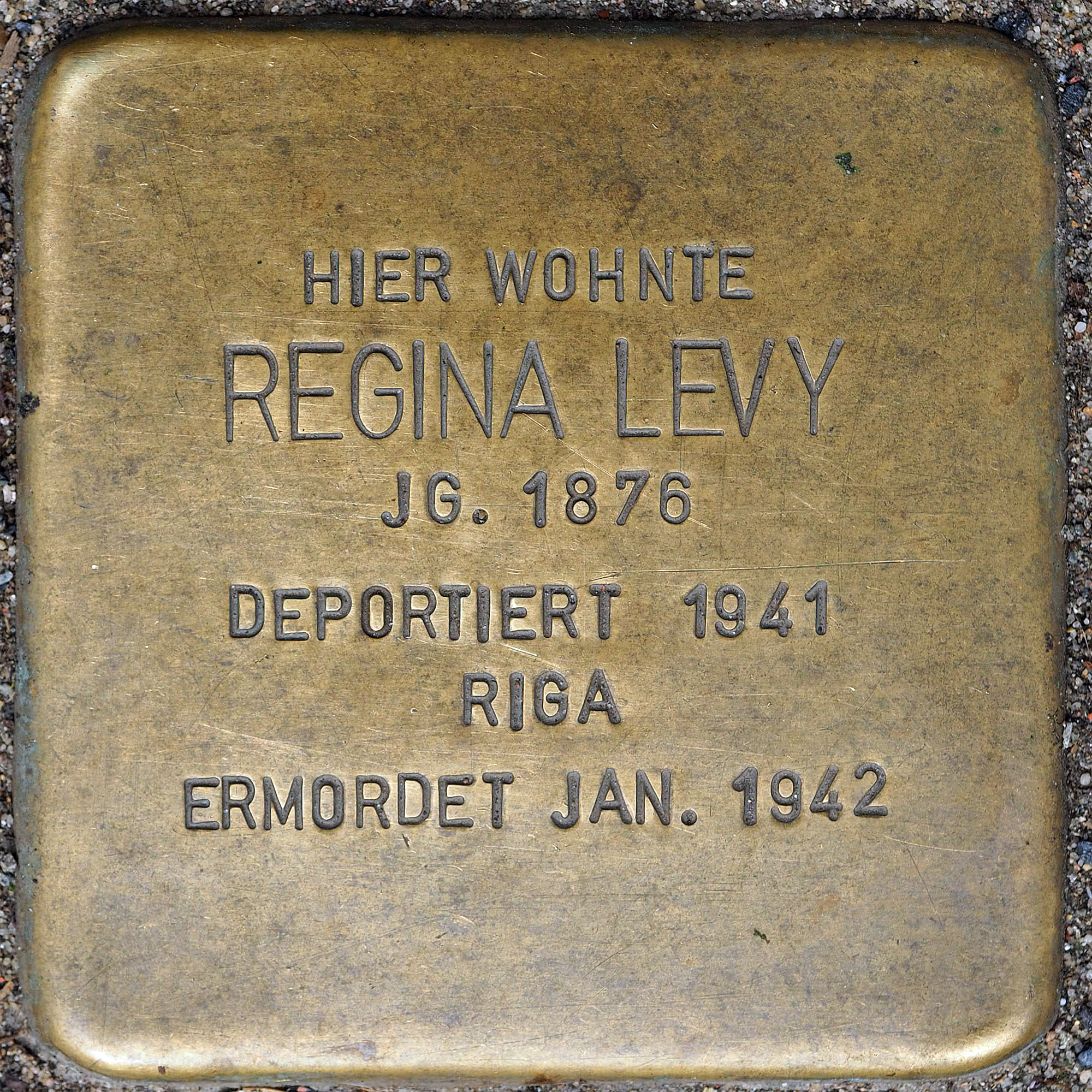 Stolpersteine MG: Levy, Regina